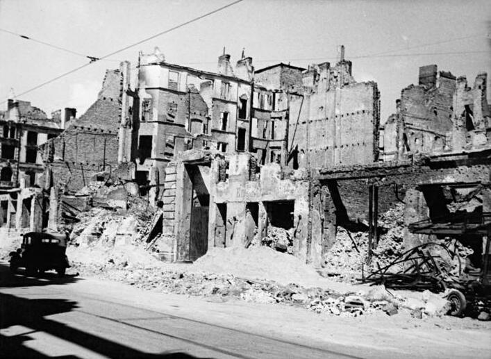 Berlin, Taubenstraße, Ruine Gedenkstätten berühmter Männer in Berlin. In der Taubenstrasse 32 hat 1823 Heinrich Heine gewohnt. Eine angloamerikanische Bombe hat das Haus niedergefegt. Aufn.: Illus Richter 5 Leu 7208-50 13.7.50